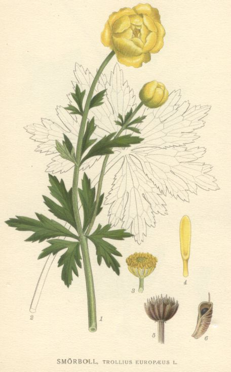 Trollius europaeus